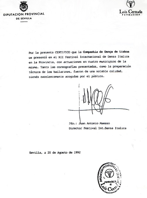 EXPO92 - Sevilha